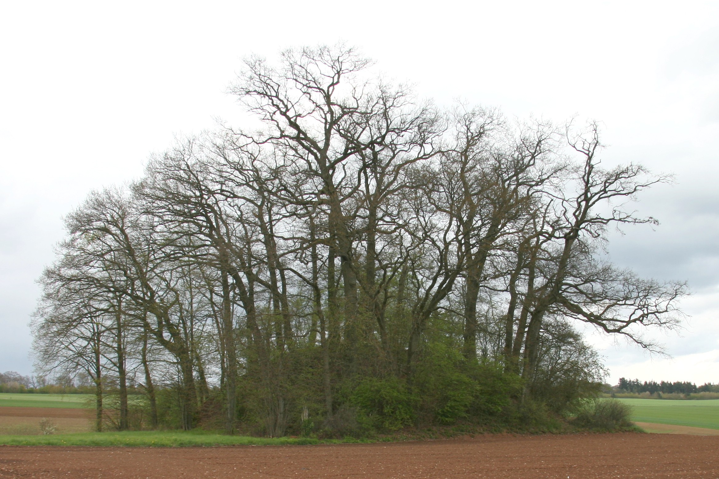 Tumulus, Réimescht Hiwwelgraf "Tonn" bei Fluessweiler.